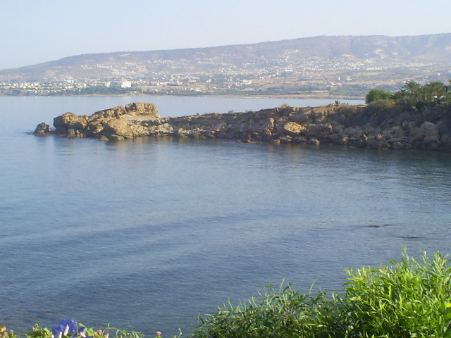 Paphos - Cyprus.